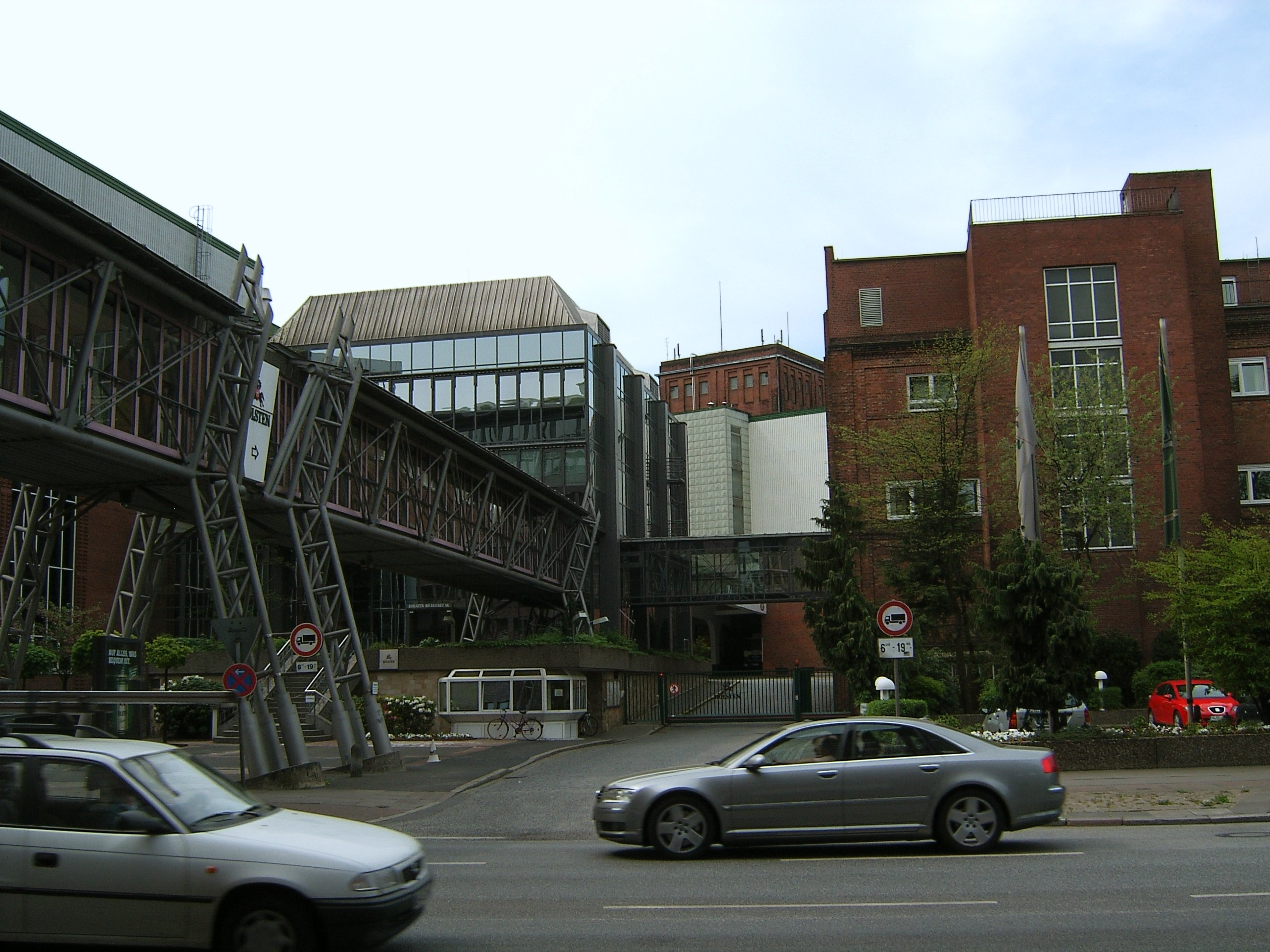 Bildbeschreibung: Hamburg, Altona, Holstenbrauerei Fotograf: selbst Datum: 13.5.2006